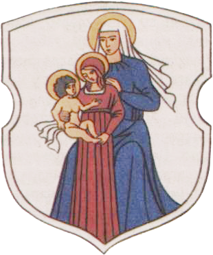 Беларуская (тарашкевіца): Герб Кобрыня